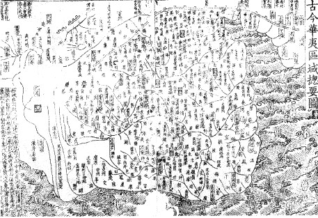 Chinaoldmap 古今華夷區域總要圖